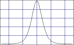 הסוליטון של משוואת KdV. הקובץ הוכן על ידי עלומים בעזרת התוכנה "מתמטיקה".